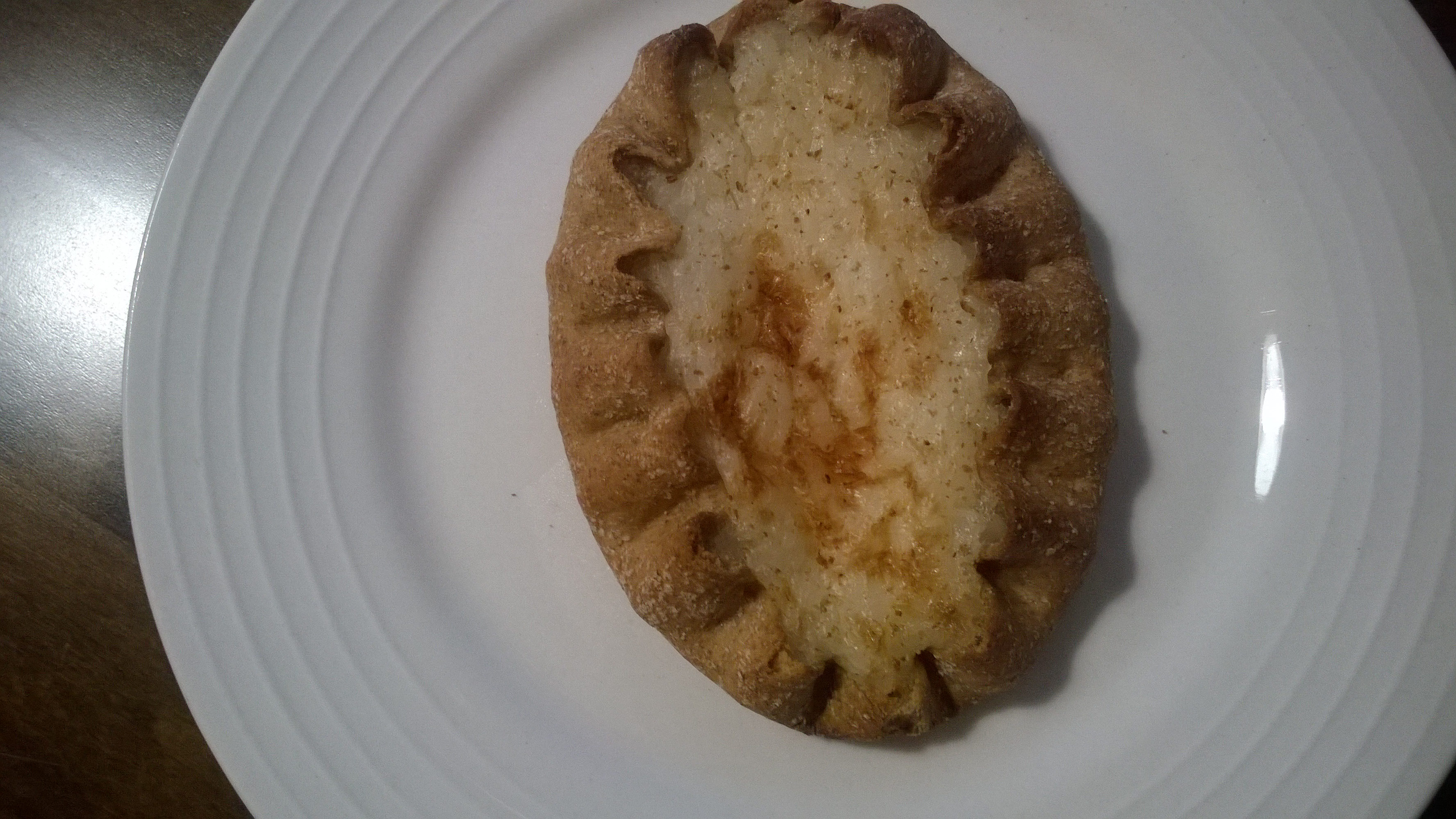 karjalanpiirakka